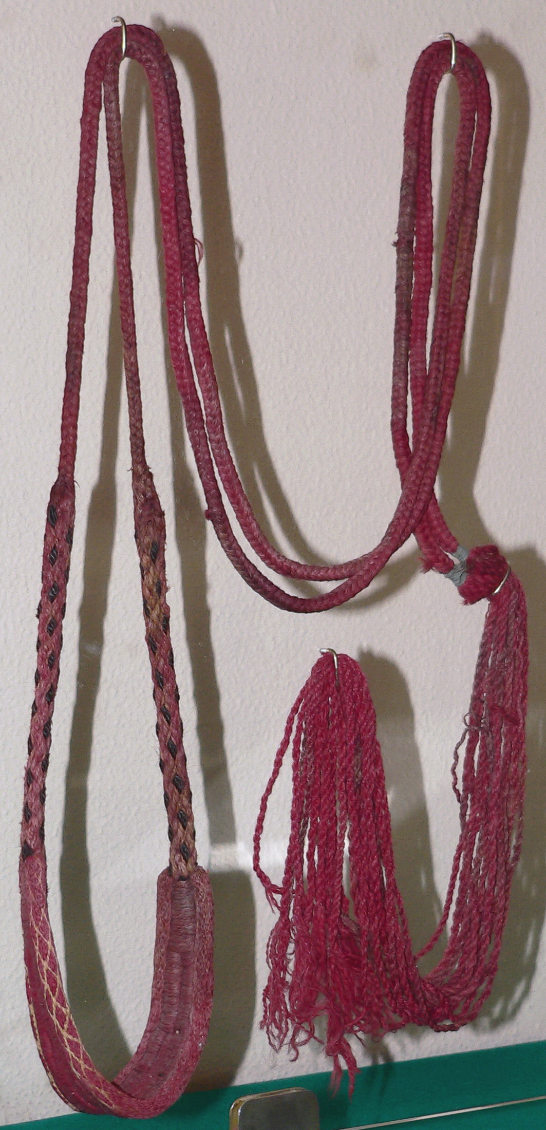 Descripción: Honda de hilos de lana Antigüedad: Entre 1.200 y 1.470 d.C Cultura: Cultura Chancay País : Perú Fotógrafo: © Manuel González Olaechea y Franco Fecha de la foto : 25 de abril de 2008